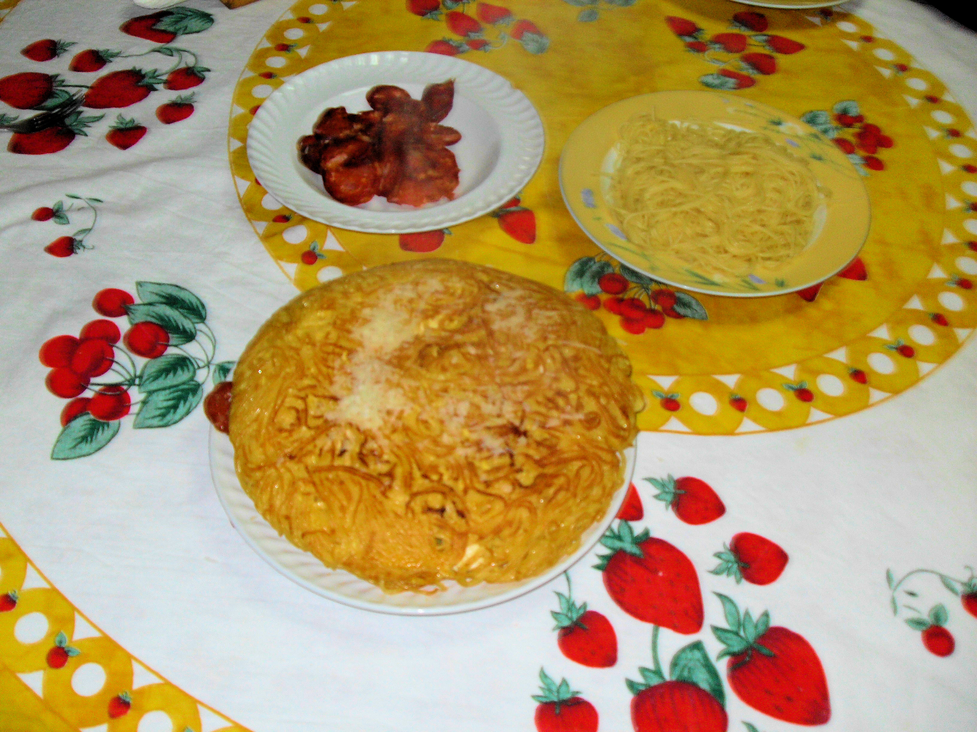 Io sottoscritto Luigi Salvatore Vadacchino, utente di Wikipedia sotto il nome di Lodewijk Vadacchino, cedo l'immagine SDC11495.jpg a Wikimedia Italia, sotto licenza CC-BY-SA, con il nome Campora_San_Giovanni_-_Frittata_i_Carunevale.jpg. L'Immagine fotografica raffigurante la tipica frittata del Martedì Grasso. Porgo come sempre i miei distintissimi saluti, con l'augurio che possiate venirmi a far visita. Vostro come sempre